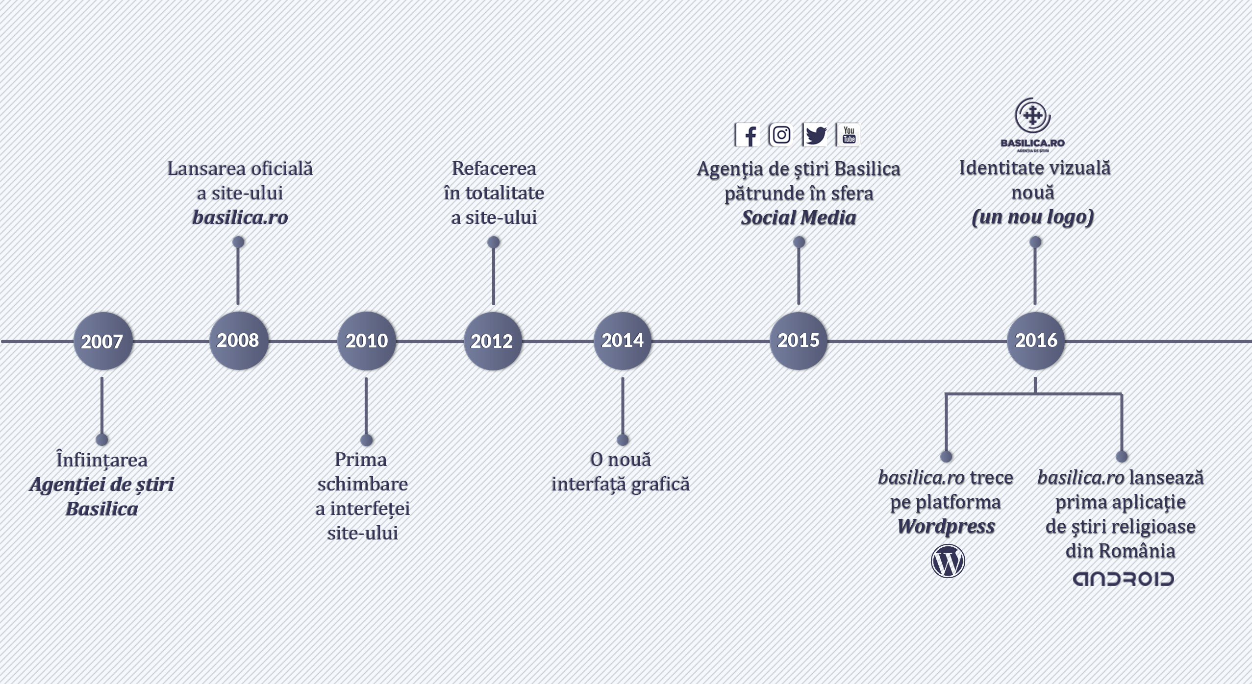 Grafică: Robert Nicolae / Basilica.ro